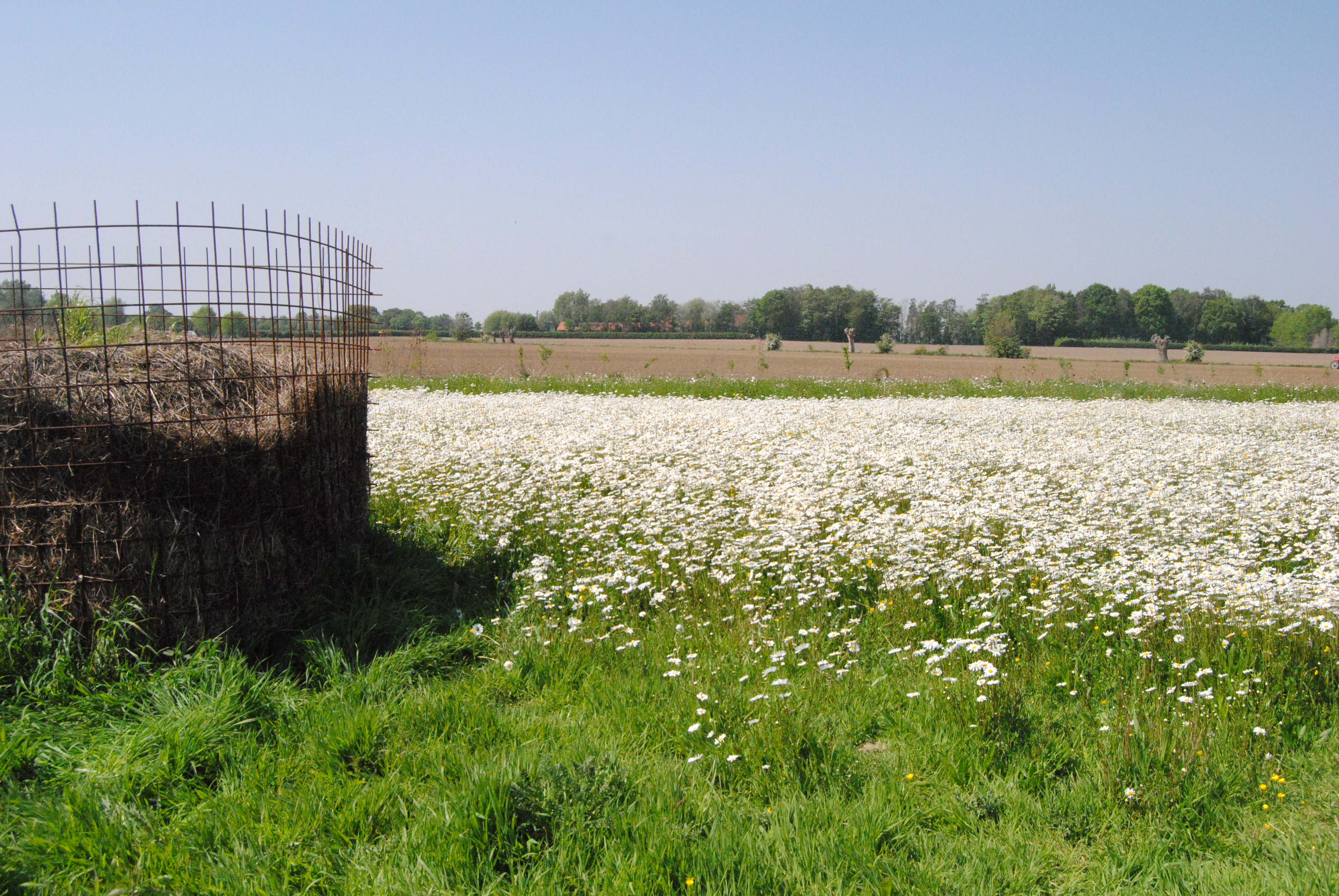 Margrietenveld in natuurgebied Vijfwegenpoel van Natuurpunt (Staden - Langemark) in 2020